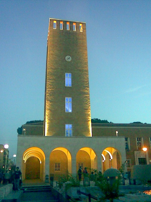 Torre dell'Indipendenza, PomeziaS